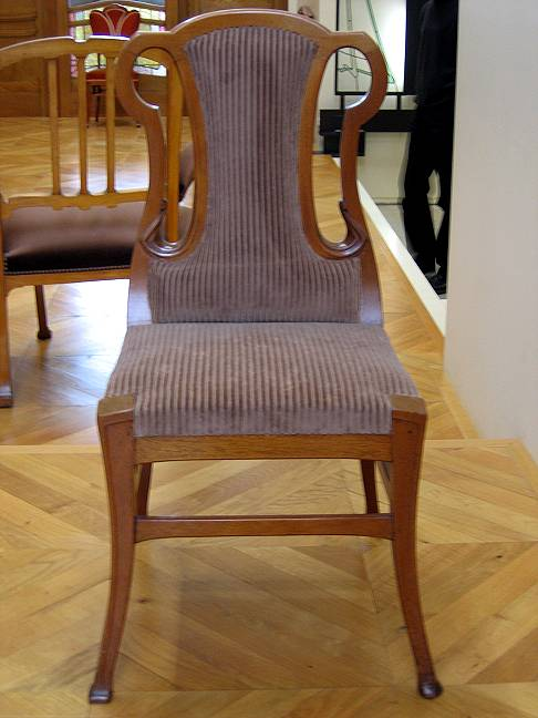 Henry van de Velde, Stuhl (1900), Musée d'Orsay, Paris